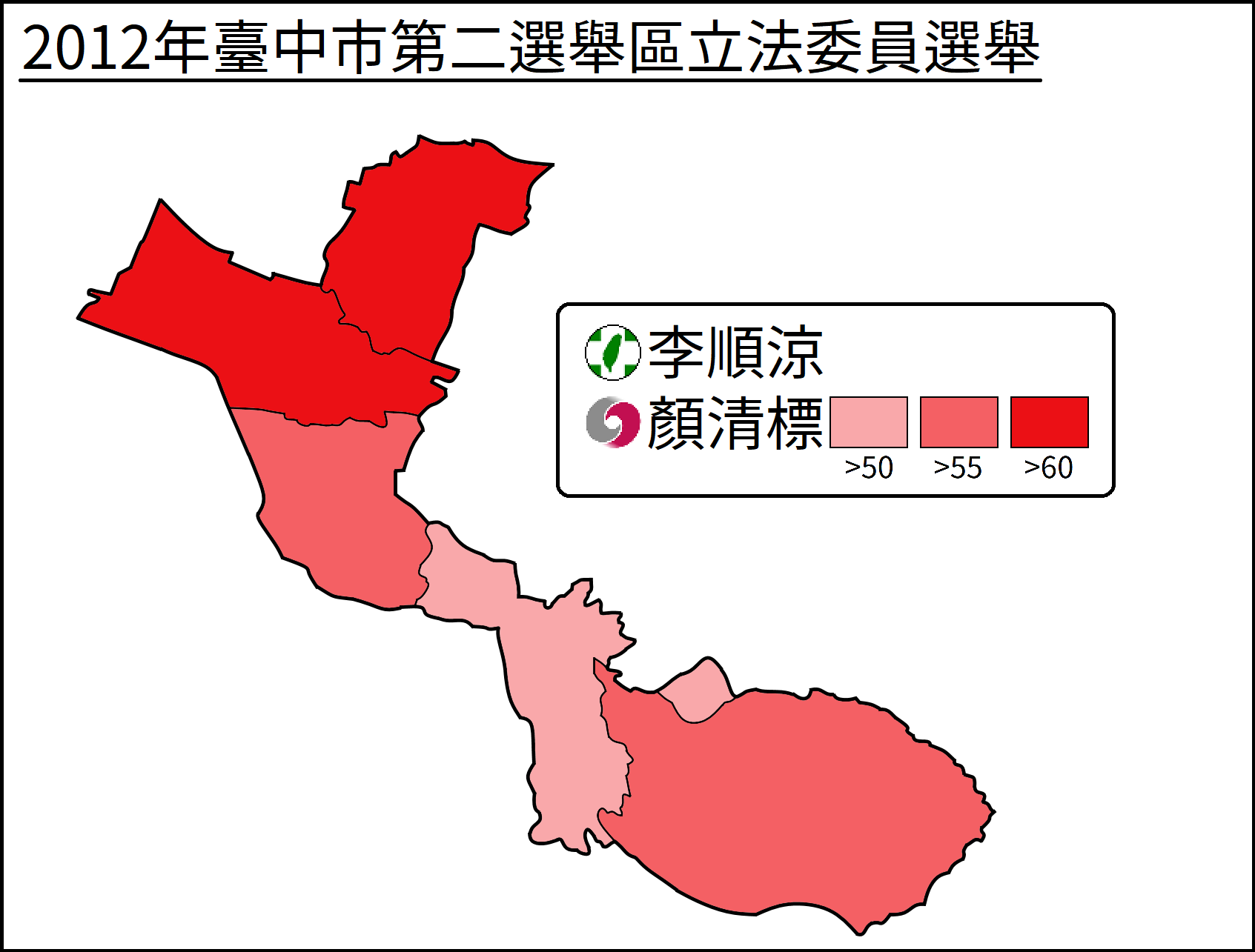 2012年立法委員選舉臺中市第二選舉區